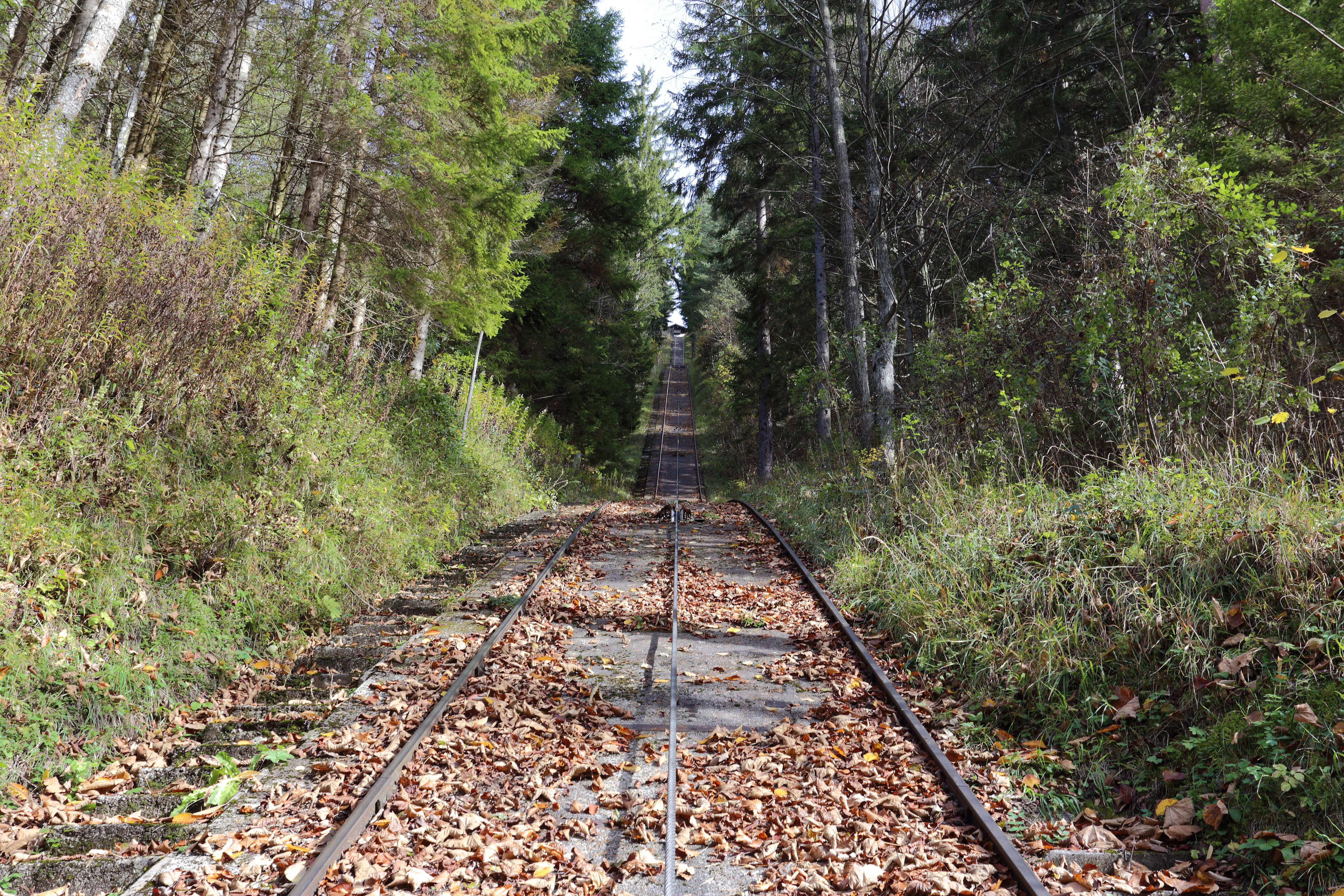 Die rund 150 Höhenmeter überwindende Material-Standseilbahn des niederösterreichischen Kraftwerkes Wienerbruck.